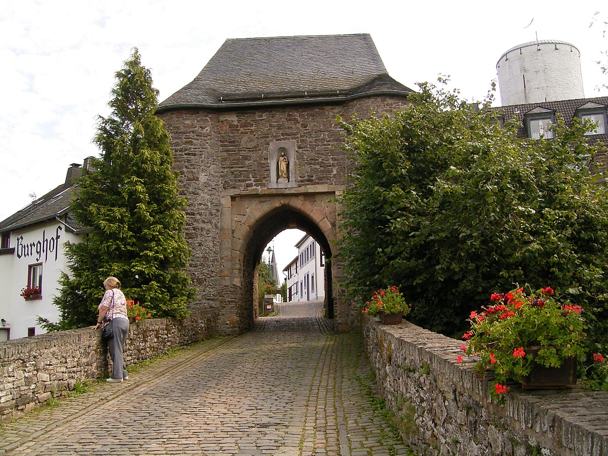 Altes Stadttor in Hellenthal